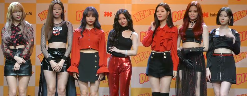 20일 오후 서울시 도봉구 창동 플랫폼 창동 61에서 다이아(유니스, 기희현, 제니, 정채연, 예빈, 은채, 주은, 솜이)의 다섯 번째 미니 앨범 'NEWTRO' 발매기념 쇼케이스가 열려 다이아가 단체 포토타임을 갖고 있다.